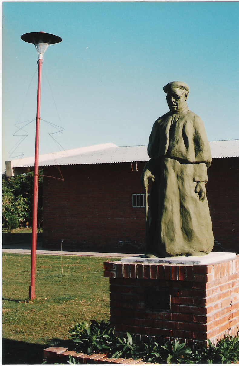 Monumento al padre Giacomozzi en Las Toscas.